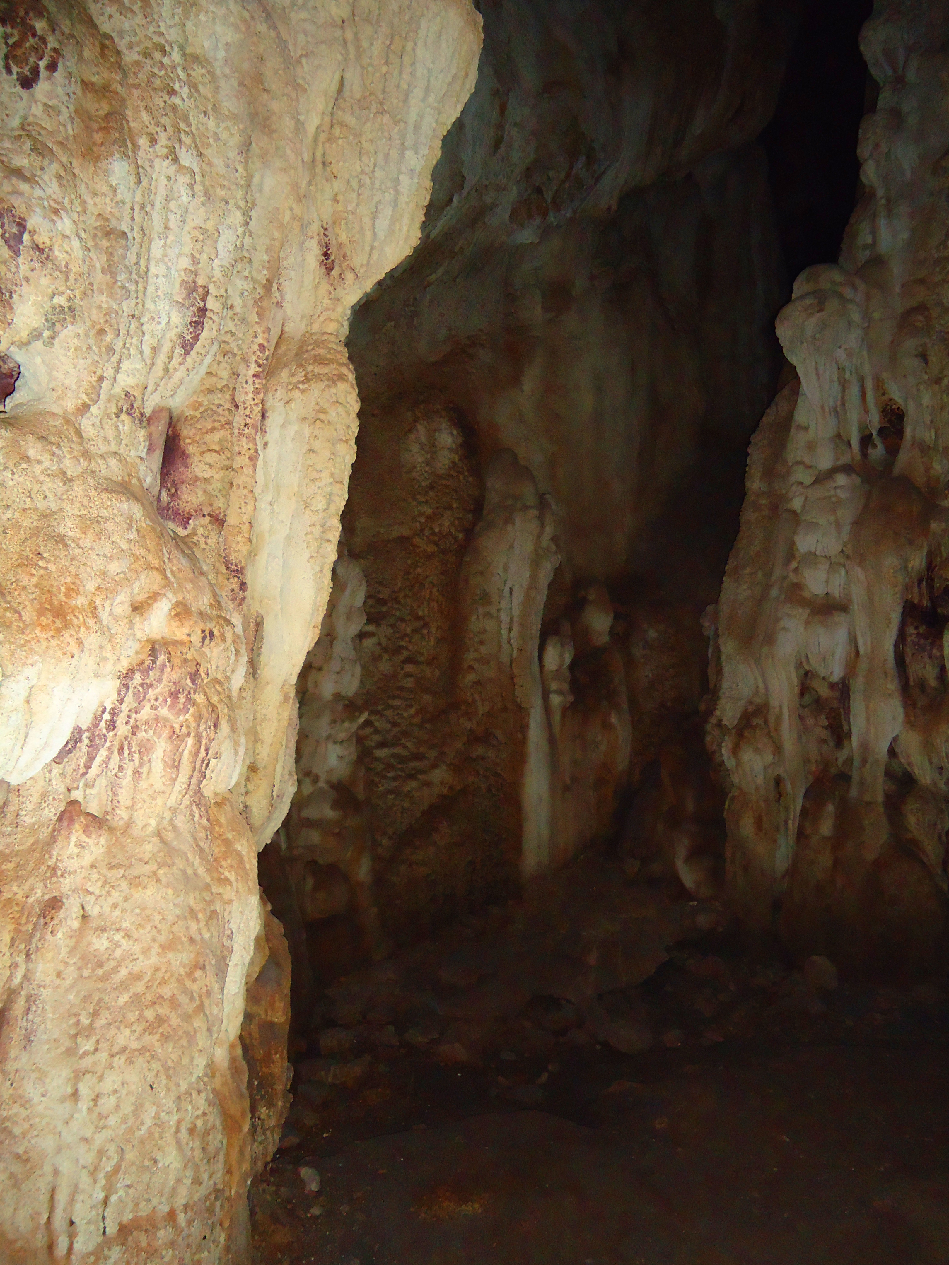 Interior de la Cueva de la Pileta, sala principal.